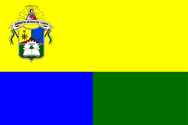 Bandera del municipio Antolín del Campo, isla de Margarita, Estado Nueva Esparta, Venezuela